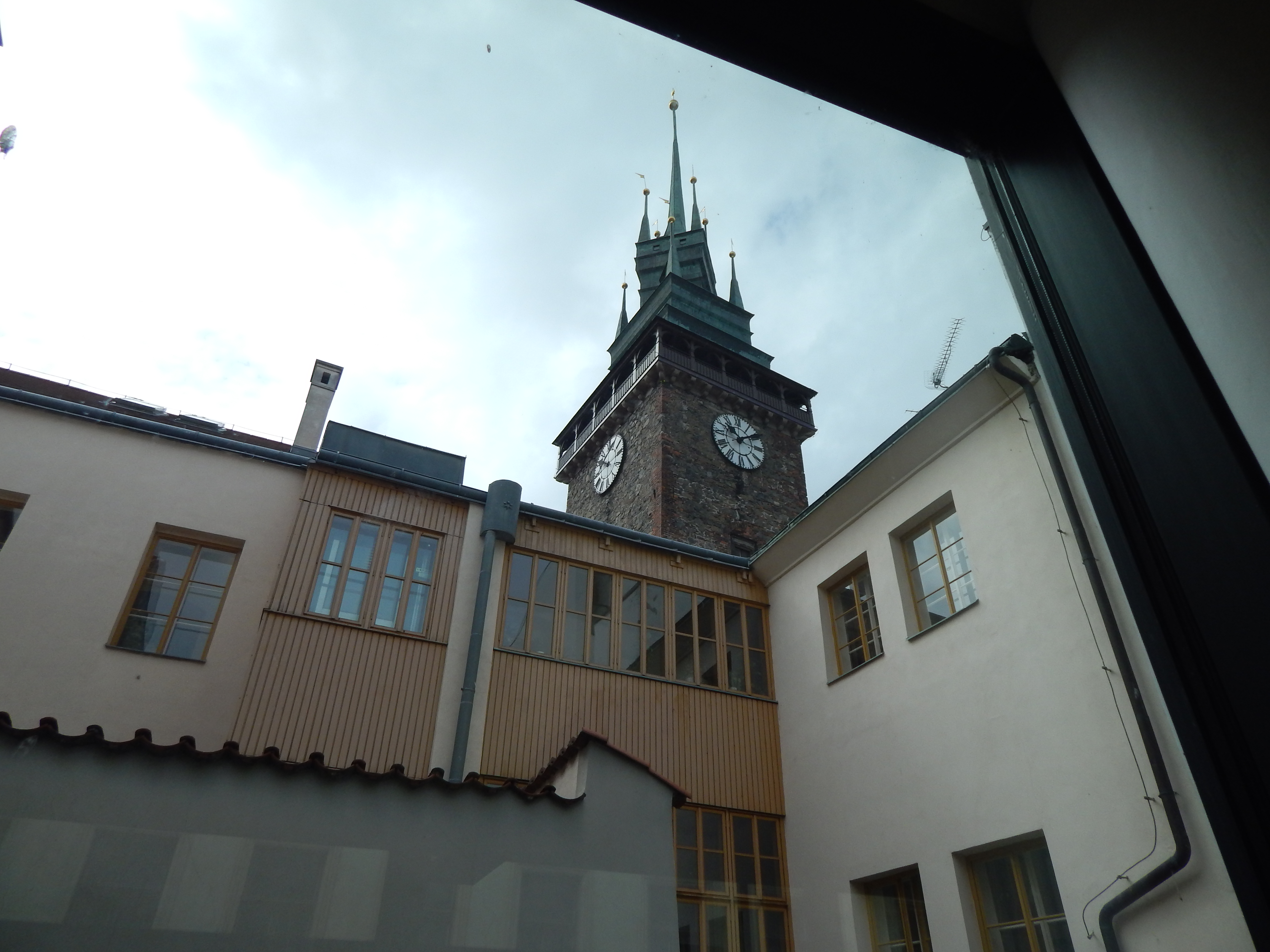 Krajská knihovna v Pardubicích, pohled do dvora